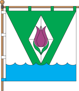 Прапор Китайгородської ОТГ